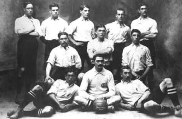 Deportivo da Sala Calvete en 1908.